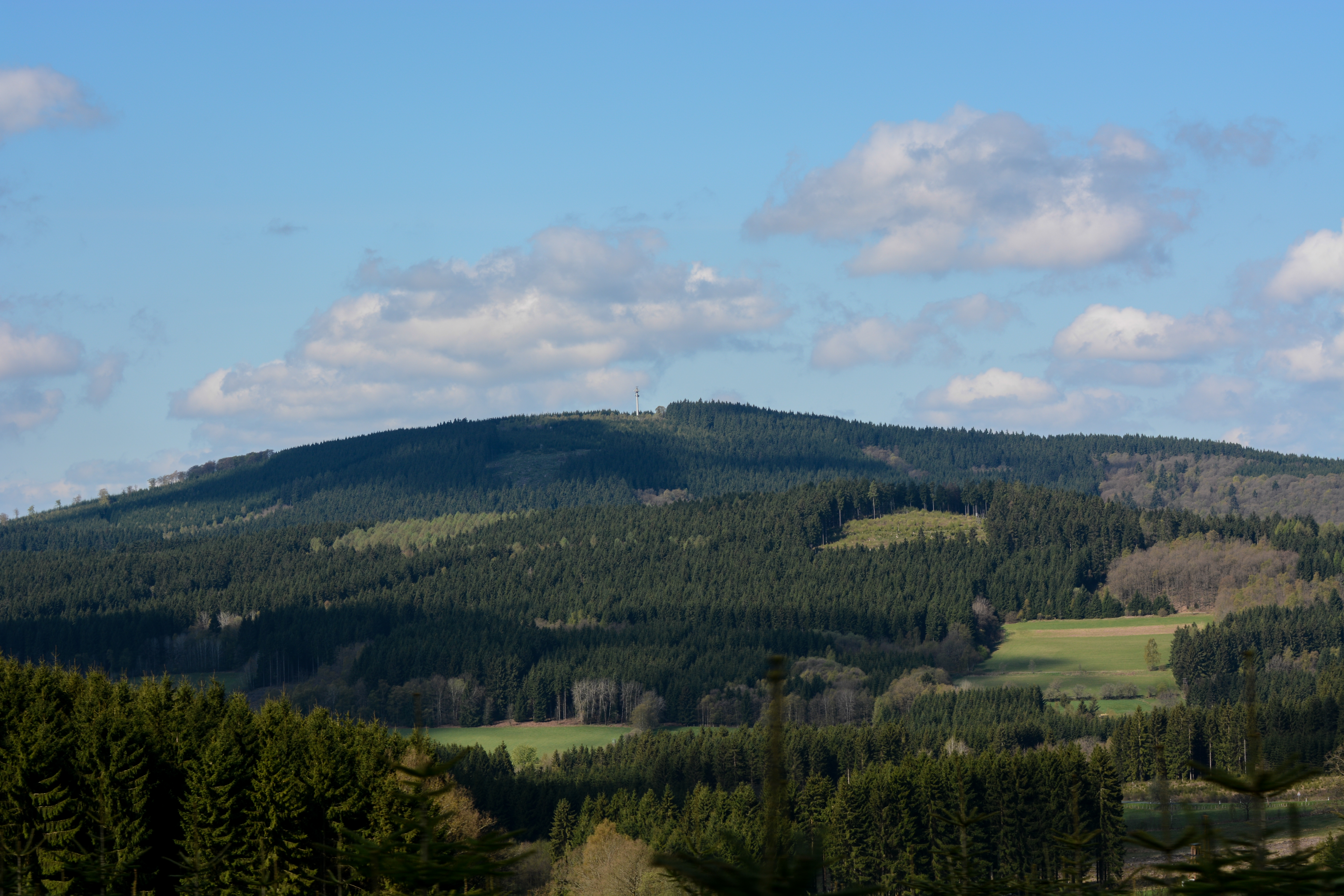 Hoher Wald mit ehmaligem Richtfunkturm der Bundeswehr, Ansicht von Brachthausen. Im Vordergrund der Silberg (546m)